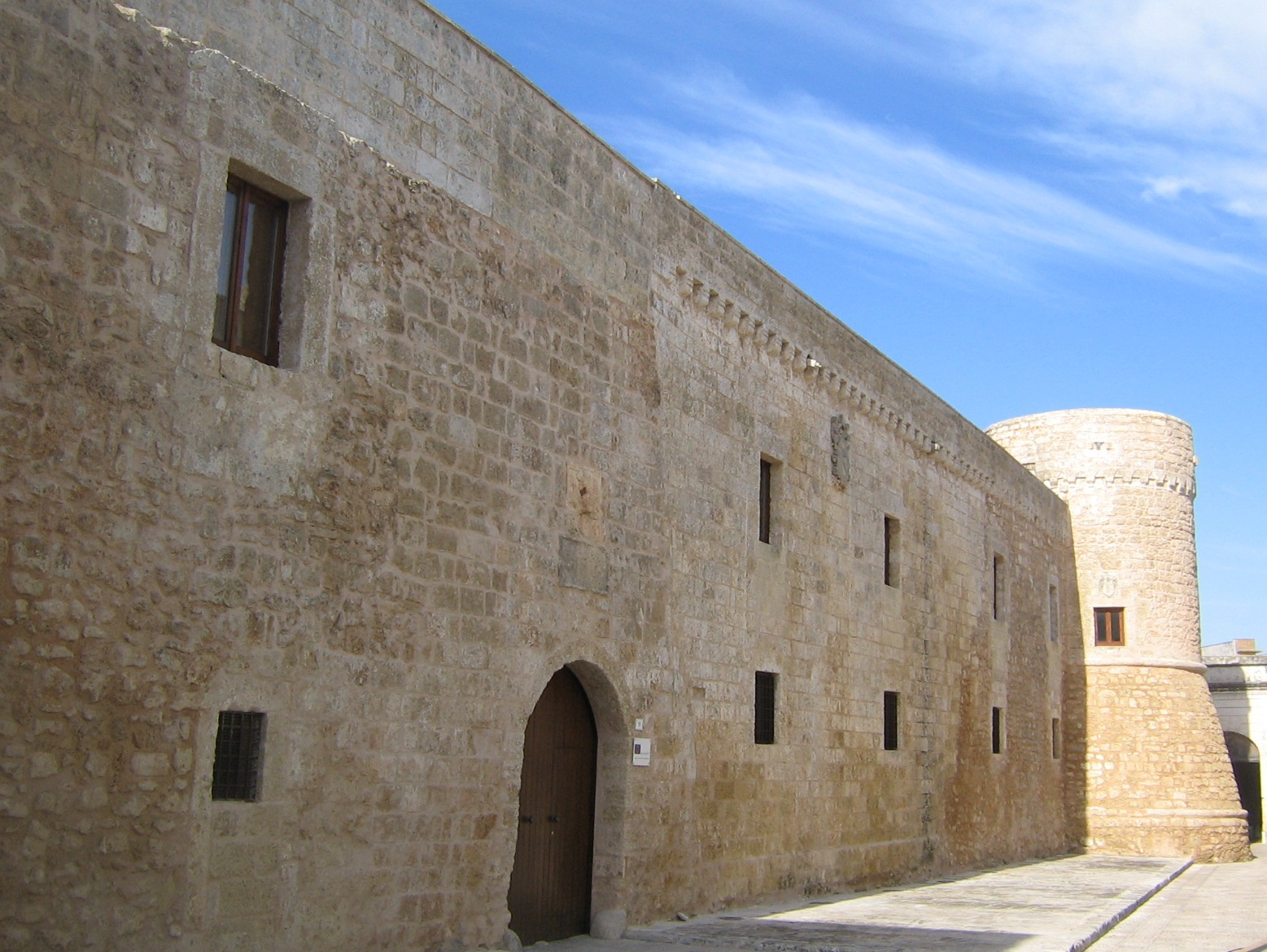 Castello di Acquarica del Capo, Lecce